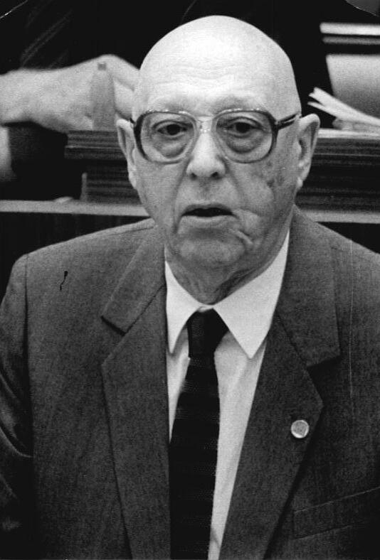 ADN-ZB/Mittelstädt 17.6.86 Berlin: Volkskammertagung In der Diskussion sprach für die NDPD-Fraktion der Abgeordnete Prof. Dr. Heinrich Homann.